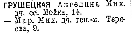 Вырезка из книги "Алфавитный указатель Жителей города С.-Петербурга, Царскаго села, Павловска и Гатчина", т. III, 1896 год. Стр. 93